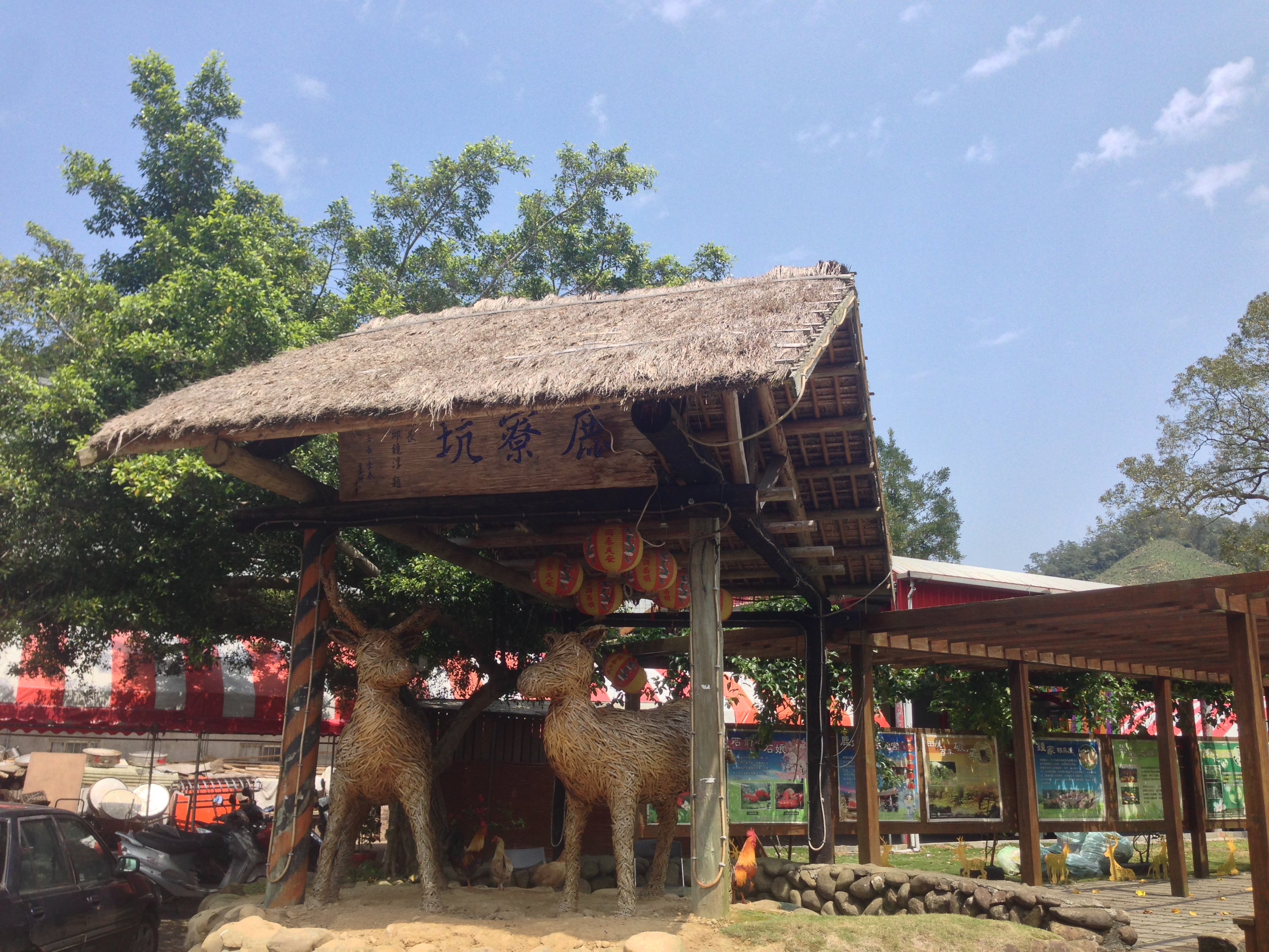 鹿寮坑佈置品